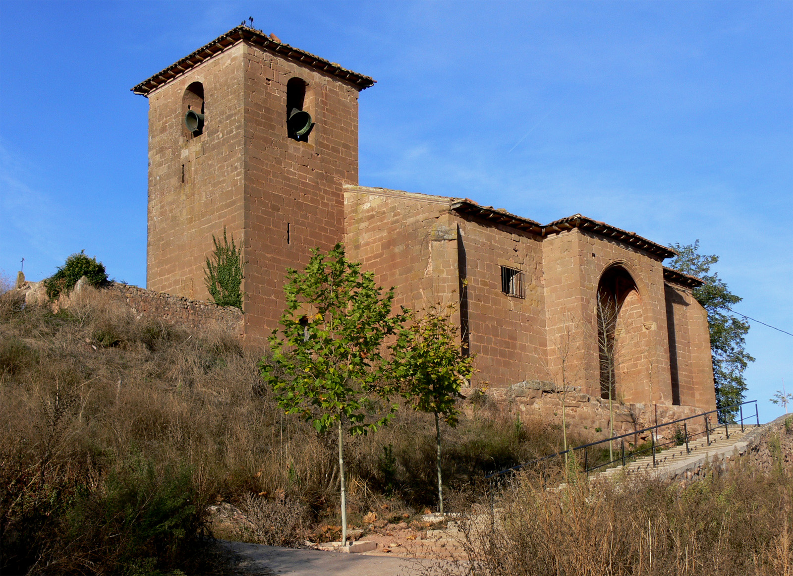 Iglesia de San Martín en Bezares, La Rioja (España).